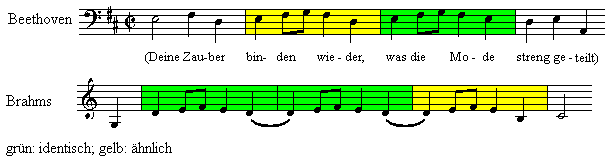 GNU-FDL, selbst erstellt